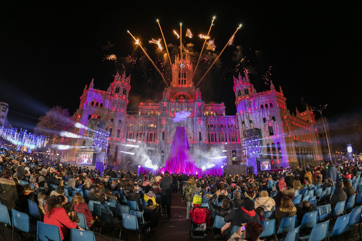 Los Reyes Magos han llegado a Madrid y, siguiendo la tradición, han dirigido unas cariñosas palabras desde Cibeles a las niñas y niños de toda España. Después de un largo viaje desde lejanas tierras de Oriente, han sido recibidos por una espectacular comitiva que ha convertido la cita más mágica del año en un grandioso espectáculo en movimiento.